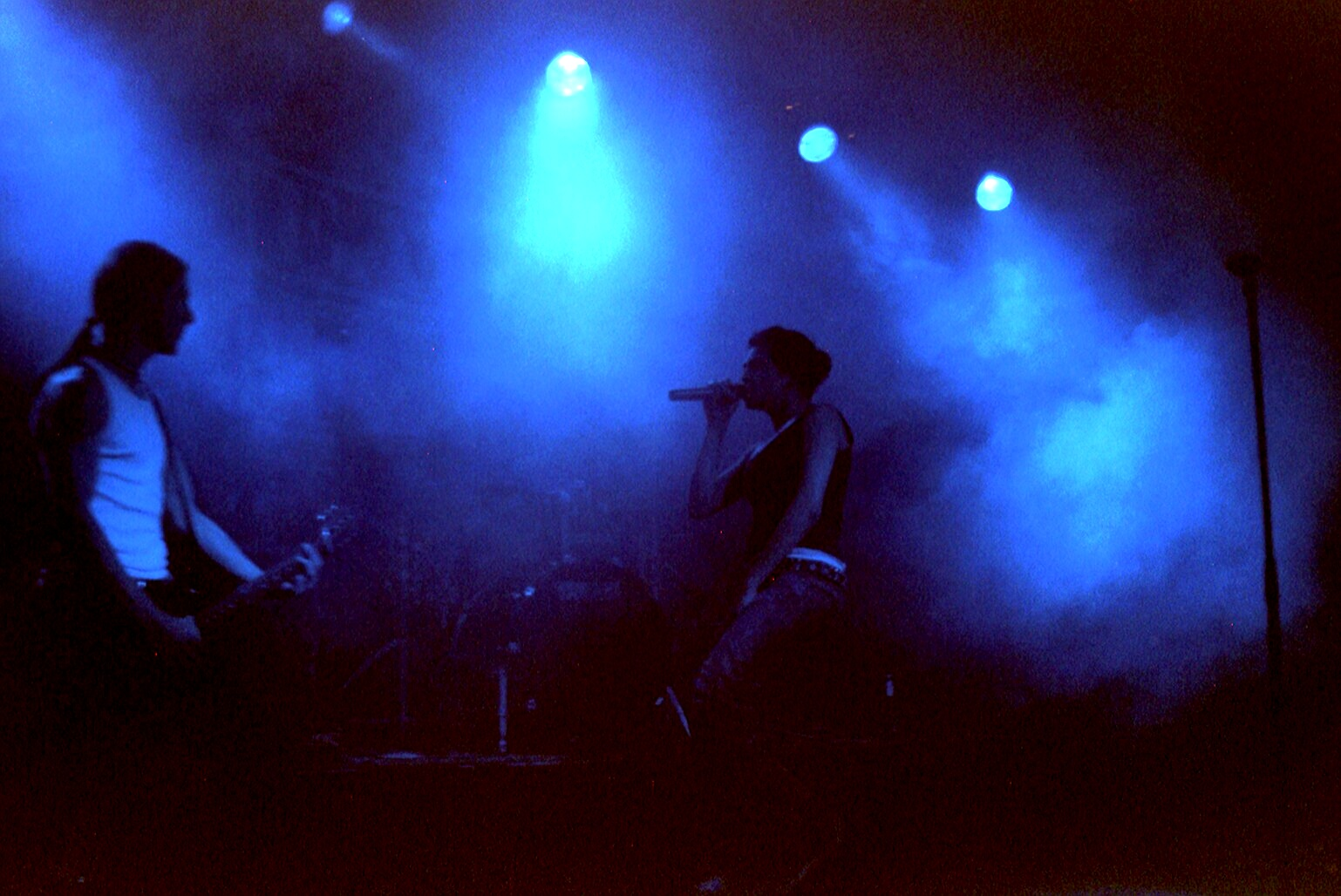 Eat no Fish bei einem Live Auftritt in Lingen an der Ems im Alten Schlachthof